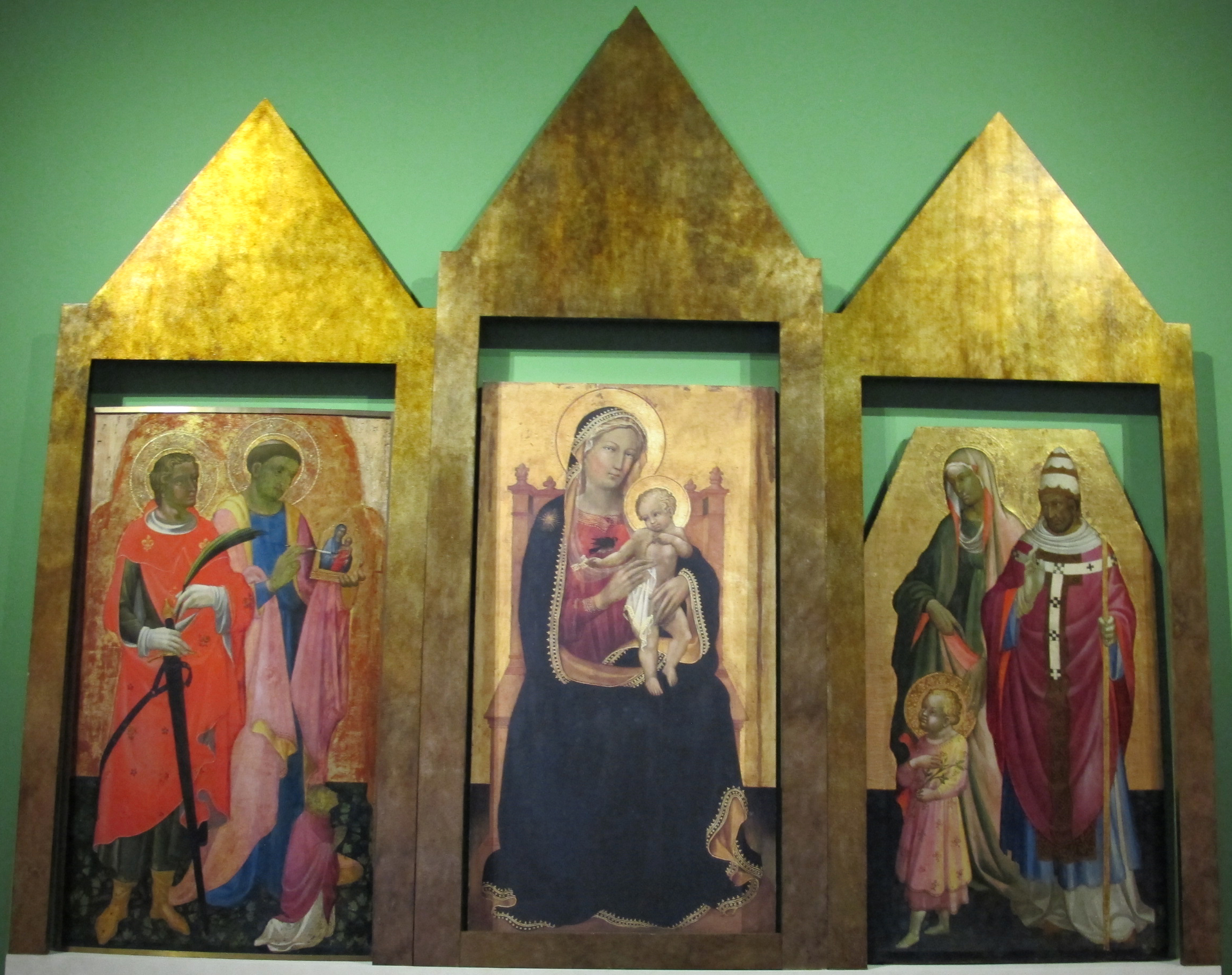 Museo nazionale di Villa Guinigi - MIBAC This is a photo of a monument which is part of cultural heritage of Italy.